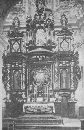 Dzieło Adama Swacha - kościół franciszkanów w Poznaniu, ołtarz NP Marii w kaplicy wschodniej